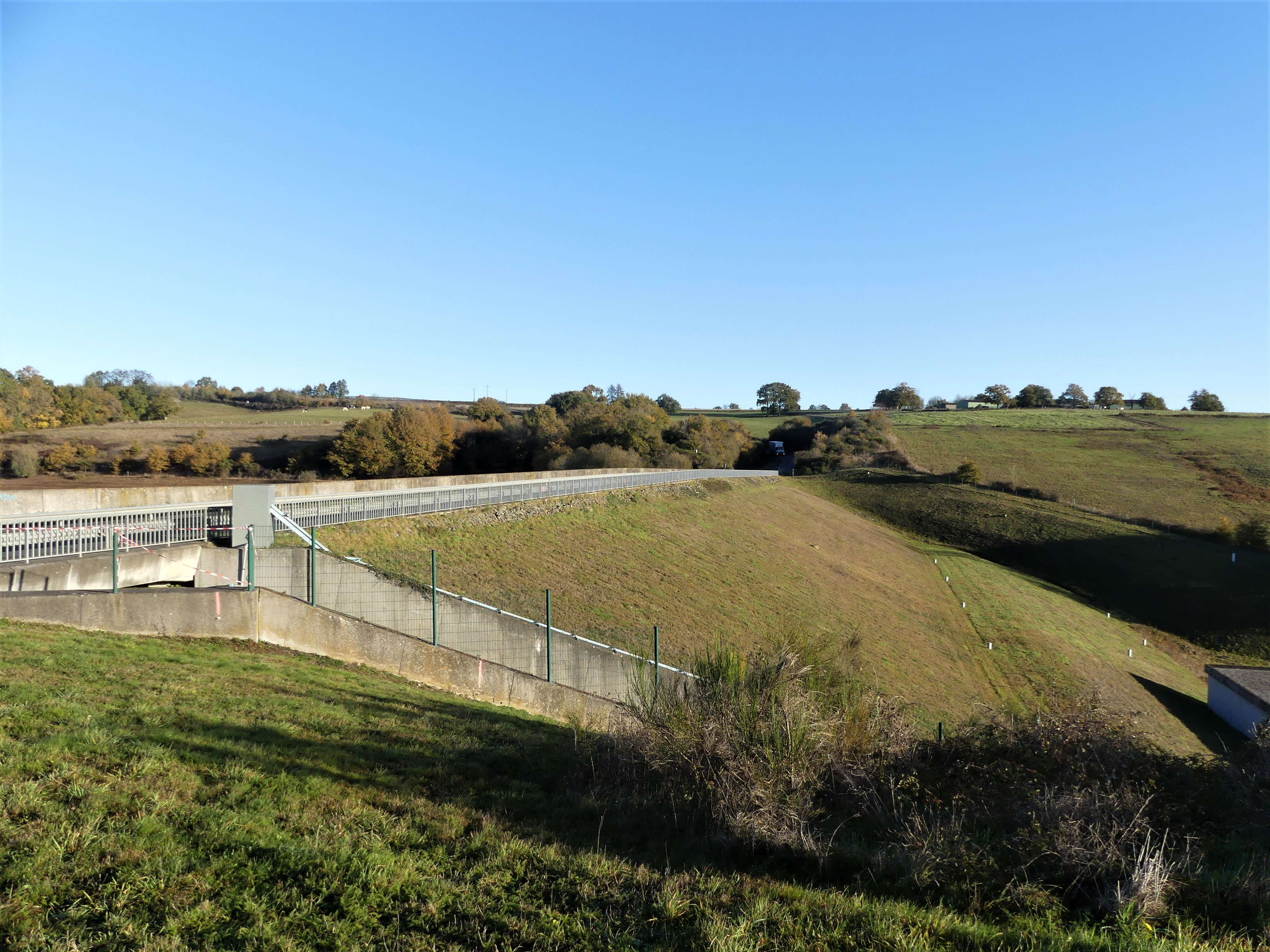 Le côté aval du barrage de la Vouraie, entre Bournezeau (au premier plan) et Saint-Hilaire-le-Vouhis (au loin), Vendée, France.